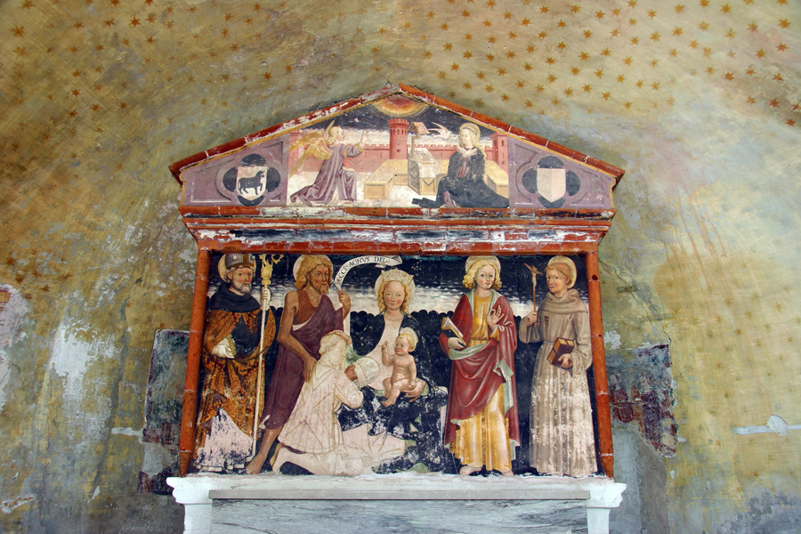 La pala d'altare affrescata della Pieve di San Giovanni a Vespolate (NO)